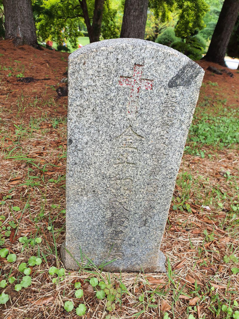 김두화 묘비 정면사진